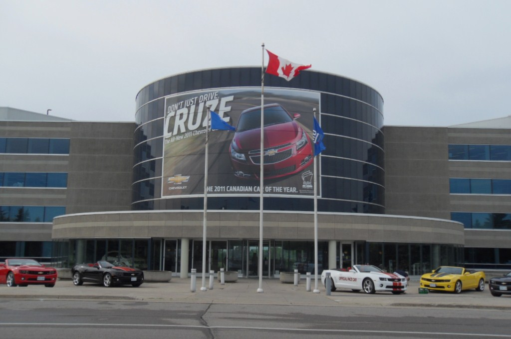 GM Canada Oshawa